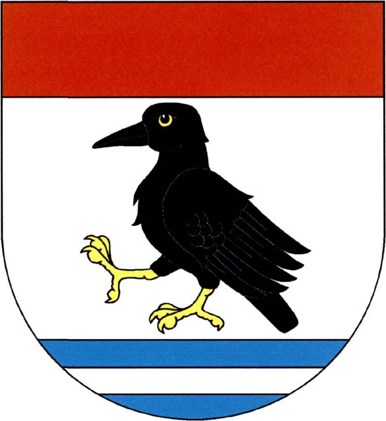 Znak obce Vraňany